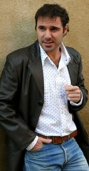 Pablo Ini.